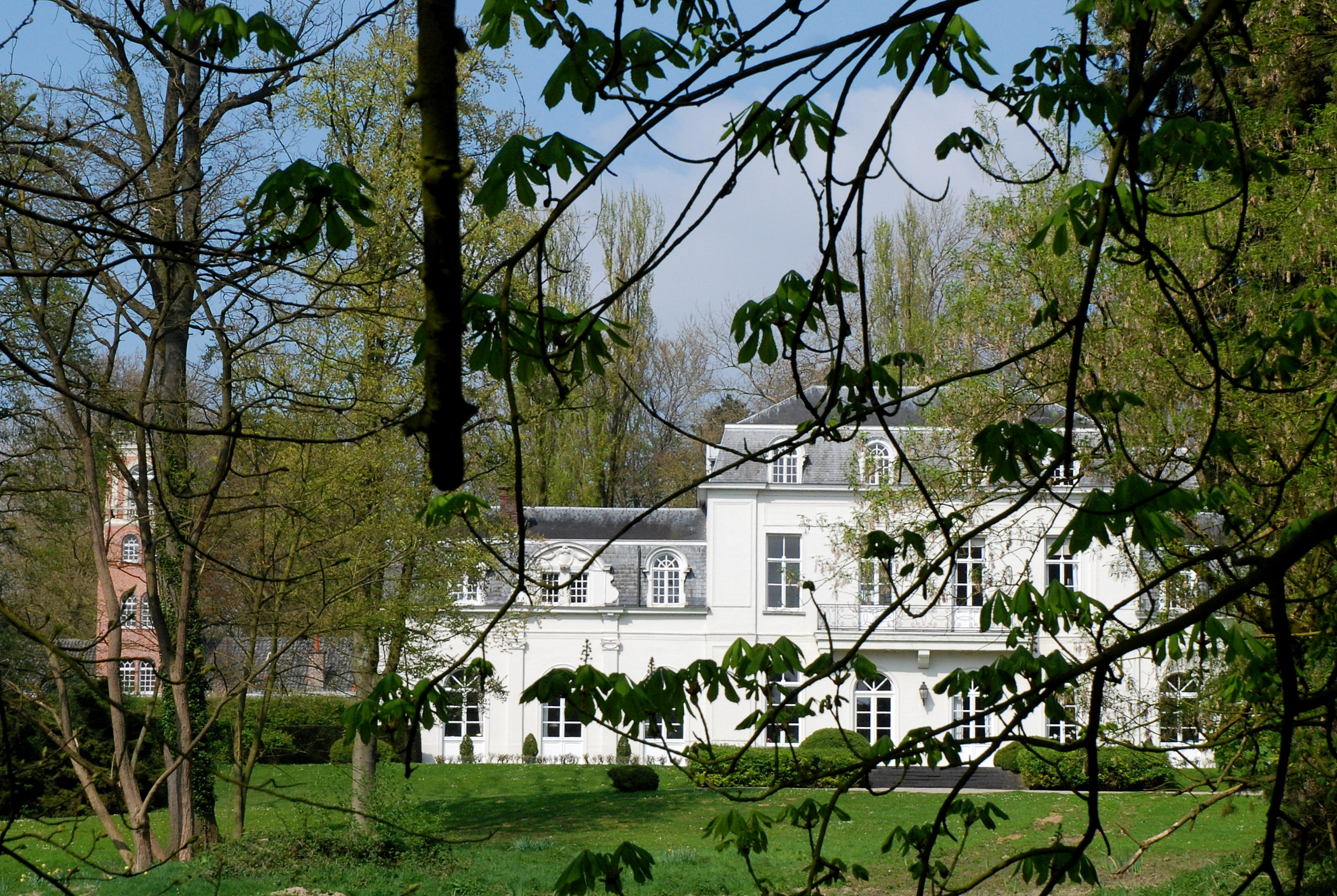 kasteel de Gerlache te Huise, België